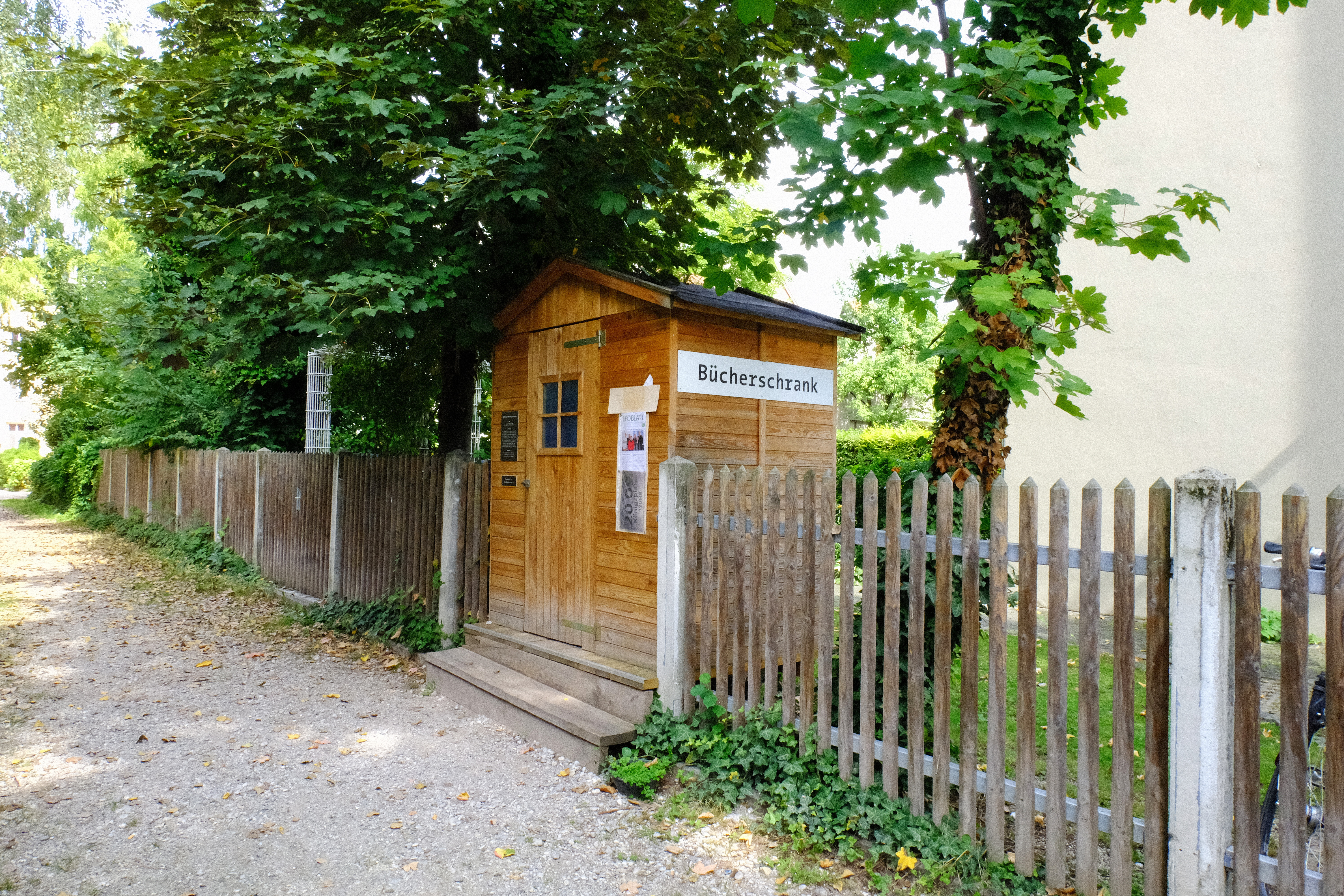 Der Bücherschrank in Sammtstraße, München-Au (2019)